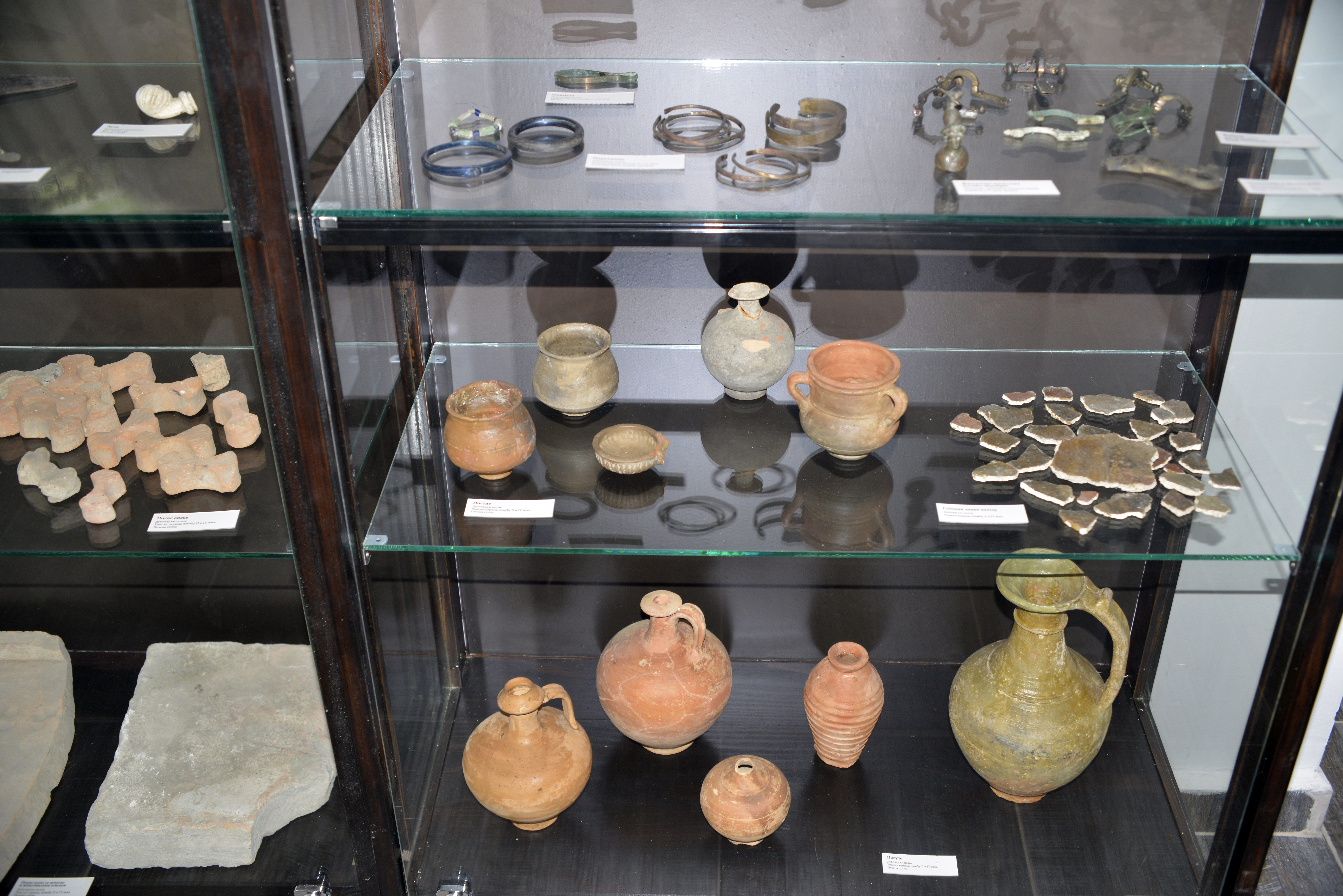 Biblioteka "Ilija Garašanin" u Grockoj - legat Aleksandra Kostića